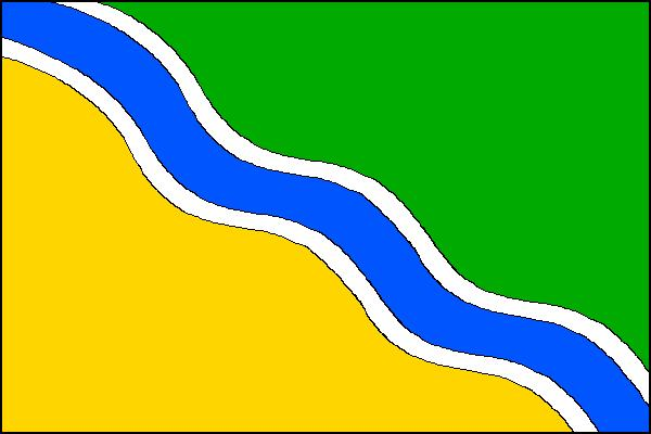 Vlajka obce Cvrčovice